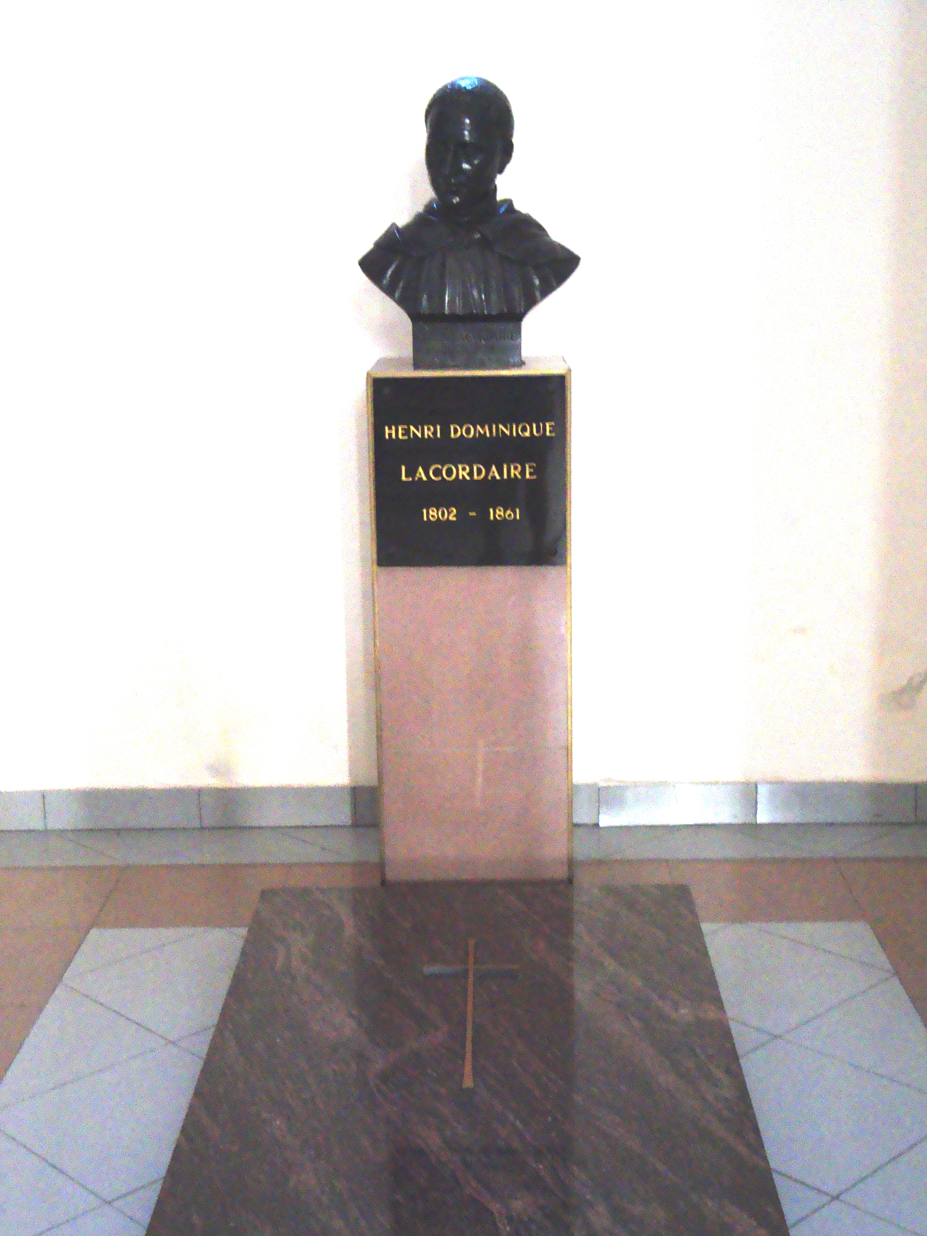 Sorèze (Tarn, Fr) tombe et buste Henri Lacordaire dans l'église Notre-Dame-de-la-Paix